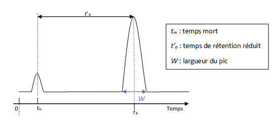 Éléments principaux d'un chromatogramme (temps mort, temps de rétention réduit, largeur du pic)